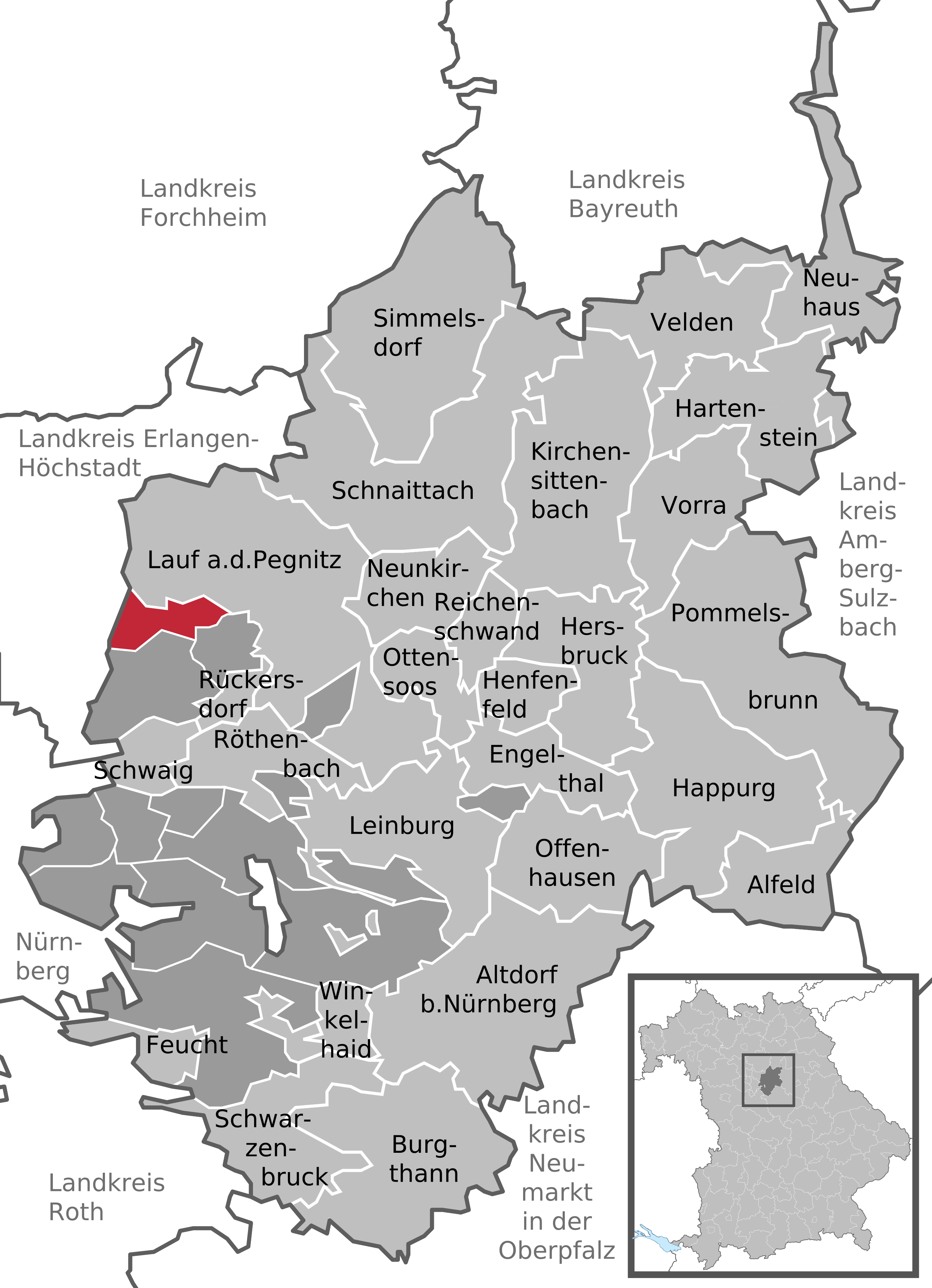 Positionskarte des gemeindefreien Gebietes Günthersbühler Forst